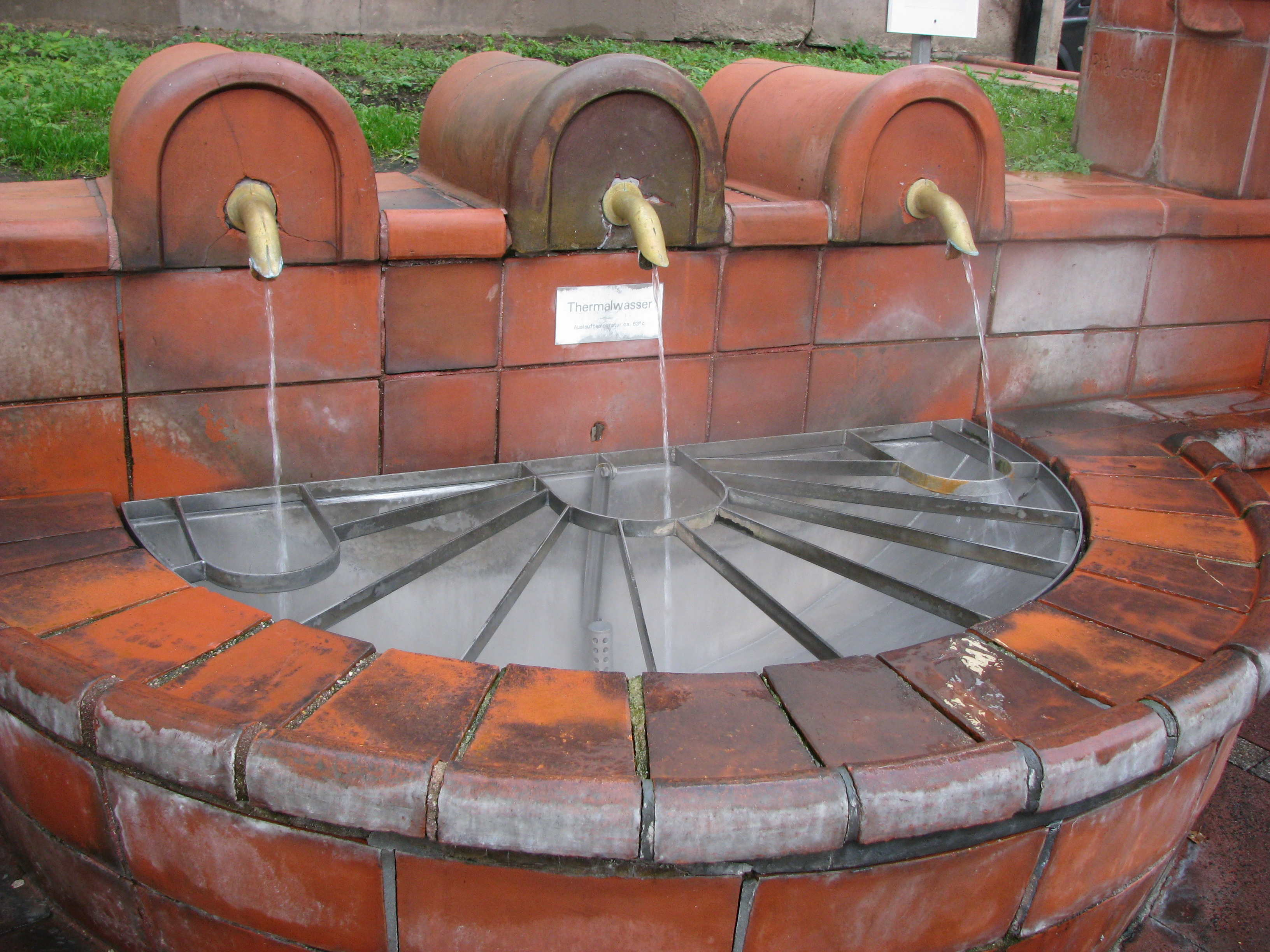 Thermalbrunnen Burtscheid (Marktbrunnen) in de-Burtscheid: Er wird vom überschüssigen Wasser der 73,1° C heißen Landesbadquelle gespeist. Die Ausflusstemperatur am Brunnen beträgt 63° C.